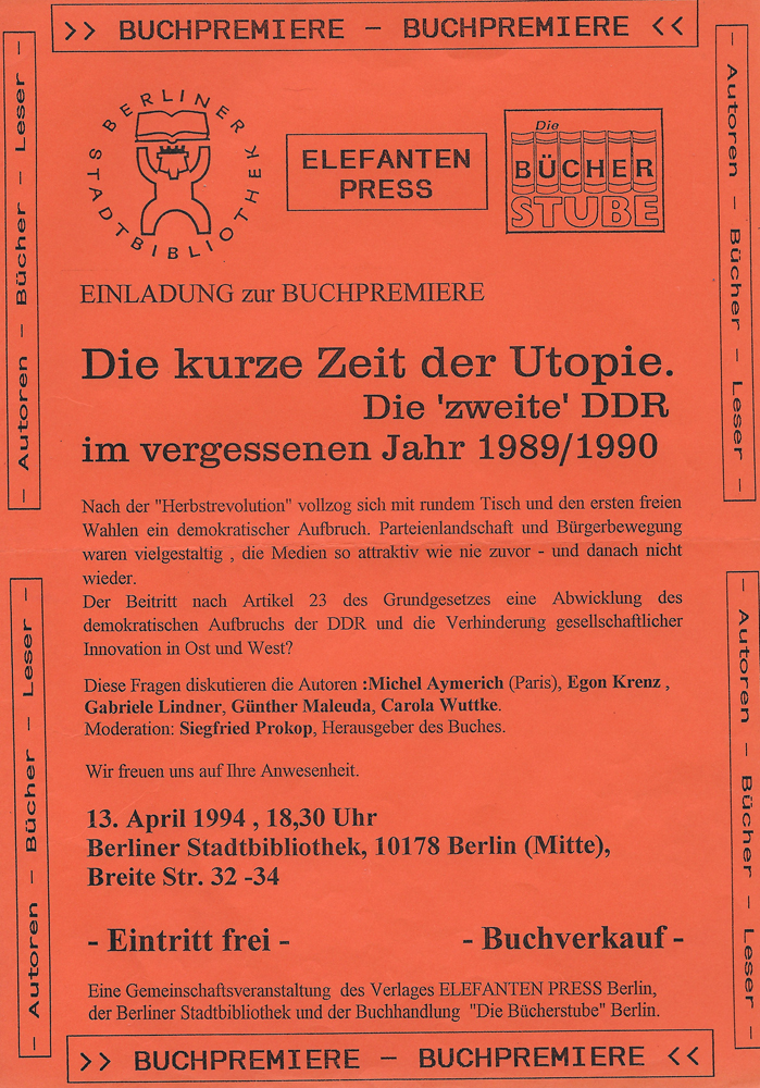 Affichette d'invitation à la première présentation du livre "Die kurze Zeit der Utopie"